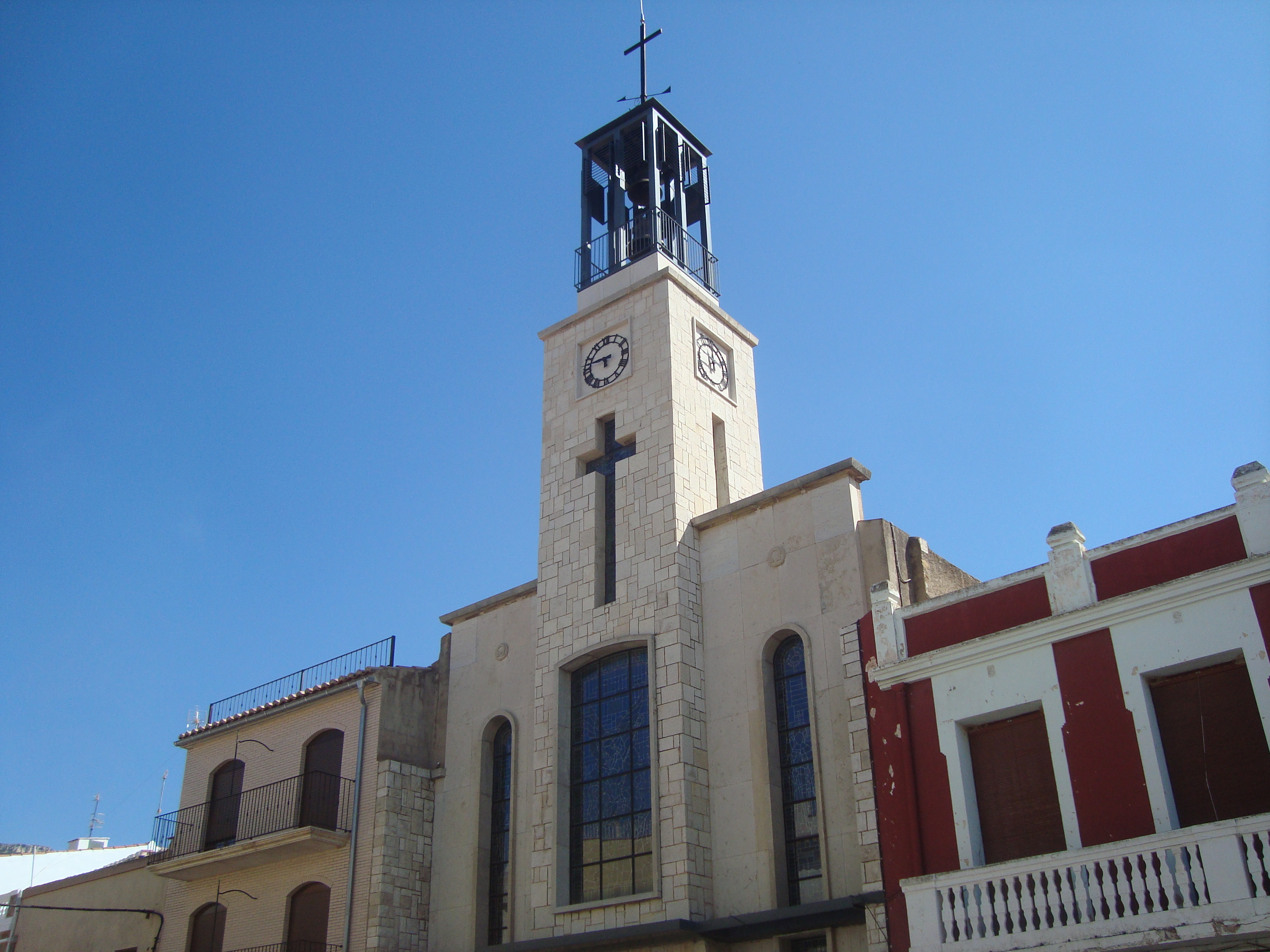 Campanario de la Iglesia Nueva de Xert